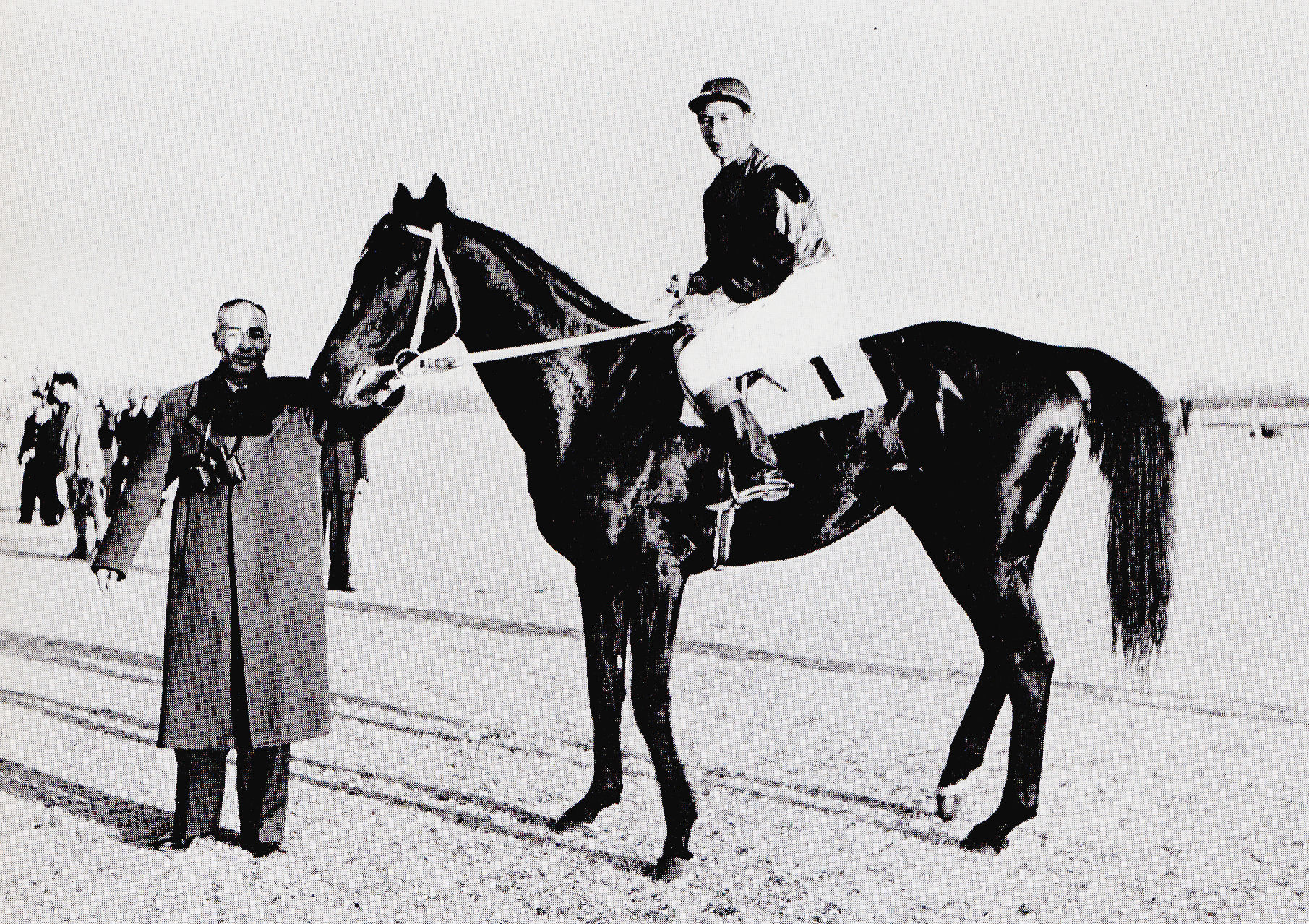 トラックオー、二本柳俊夫騎手（1953年毎日王冠）